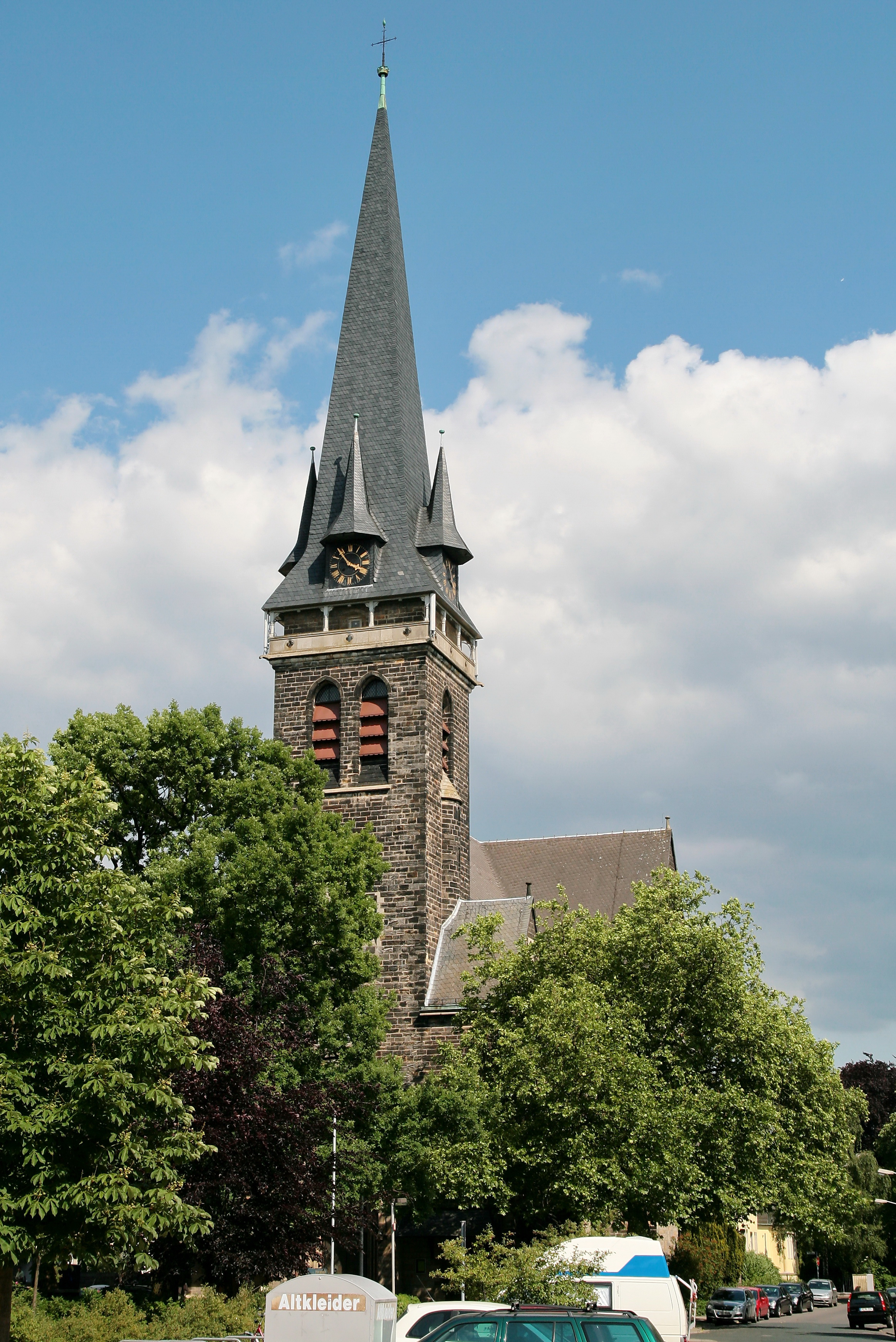 Kirche Herrenhausen (Hannover), Niedersachsen, Deutschland